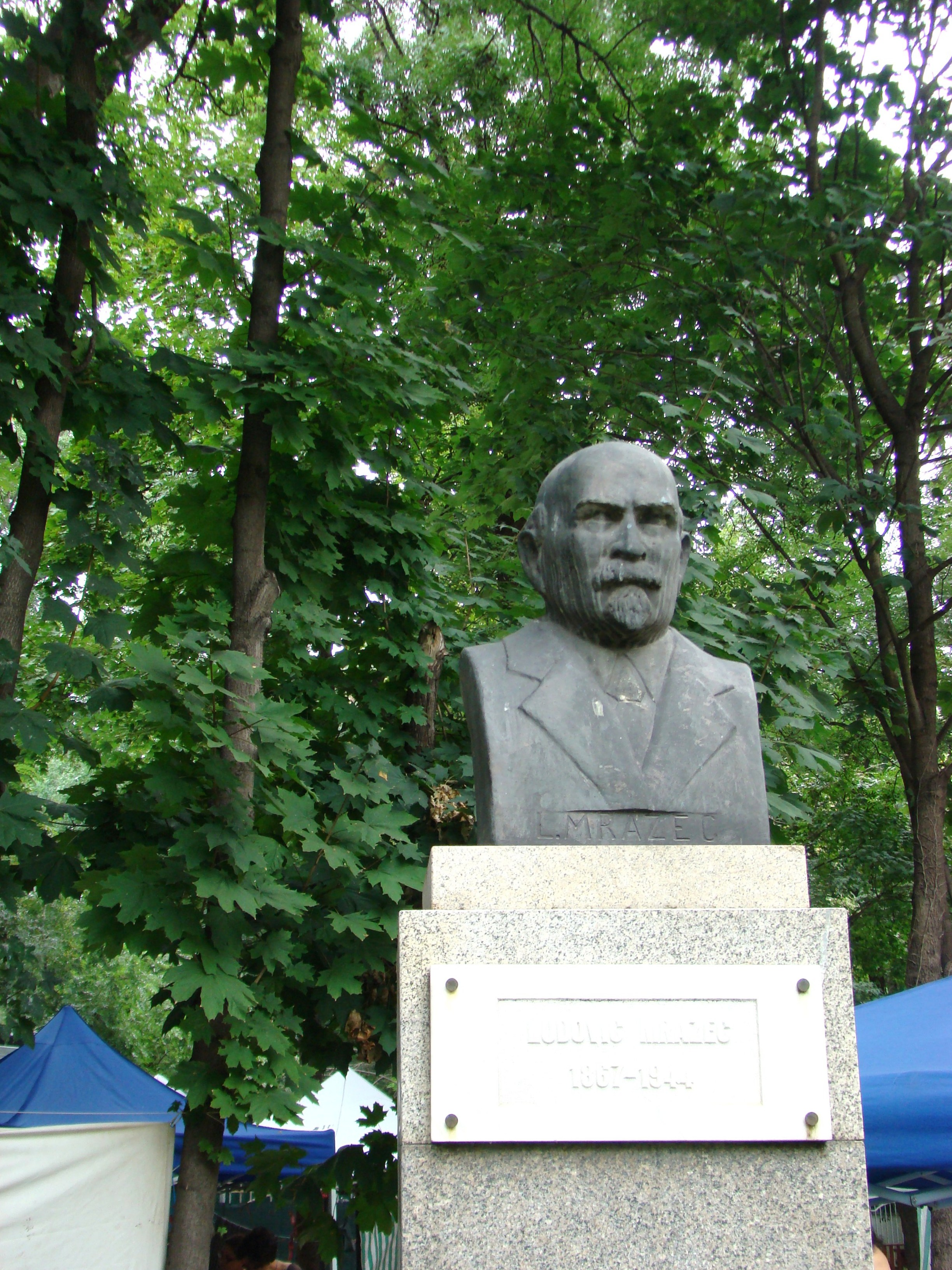 Bustul lui Ludovic Mrazek în curtea Institutului Geologic